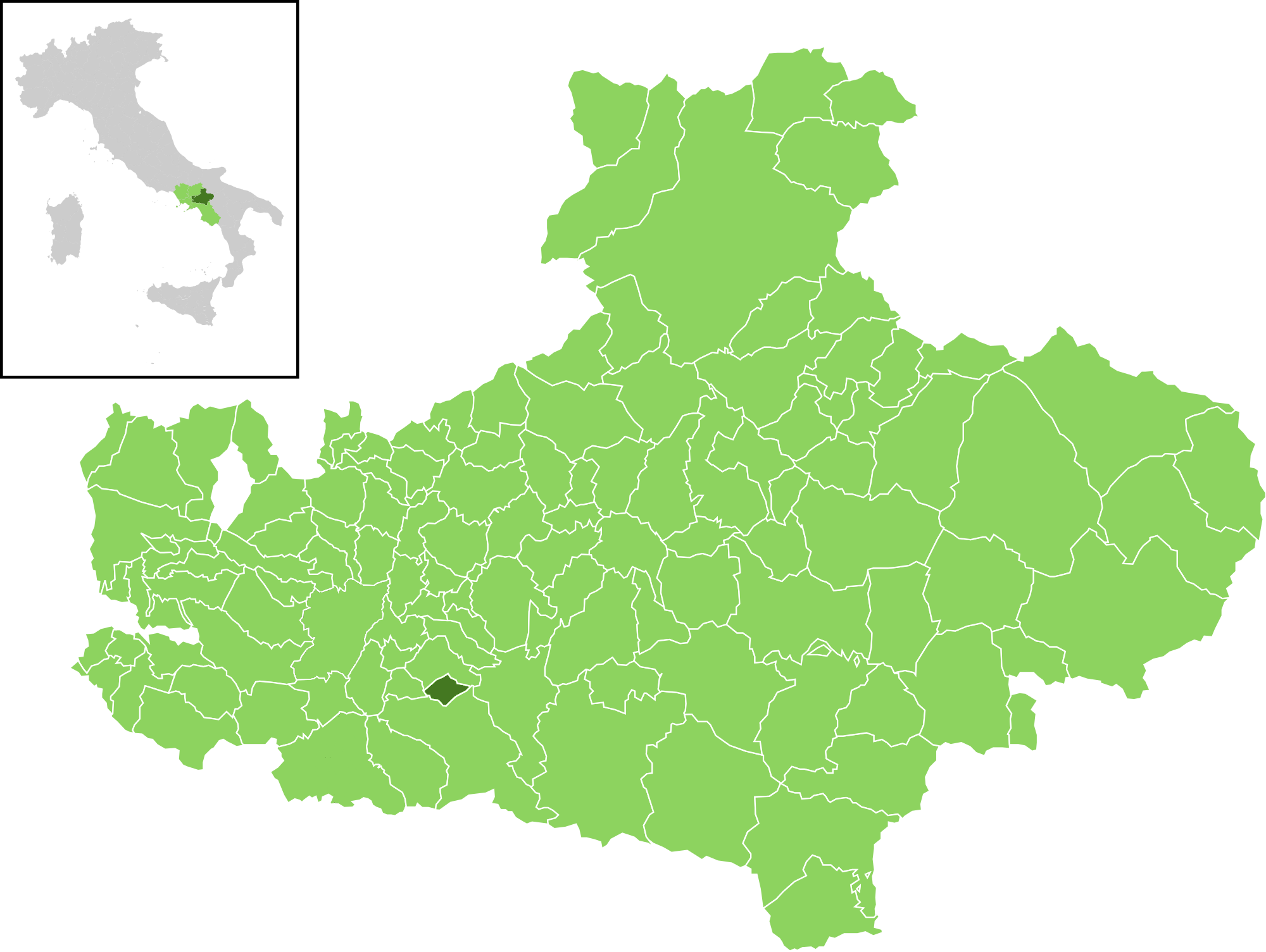 Posizione del comune all'interno della provincia di Avellino